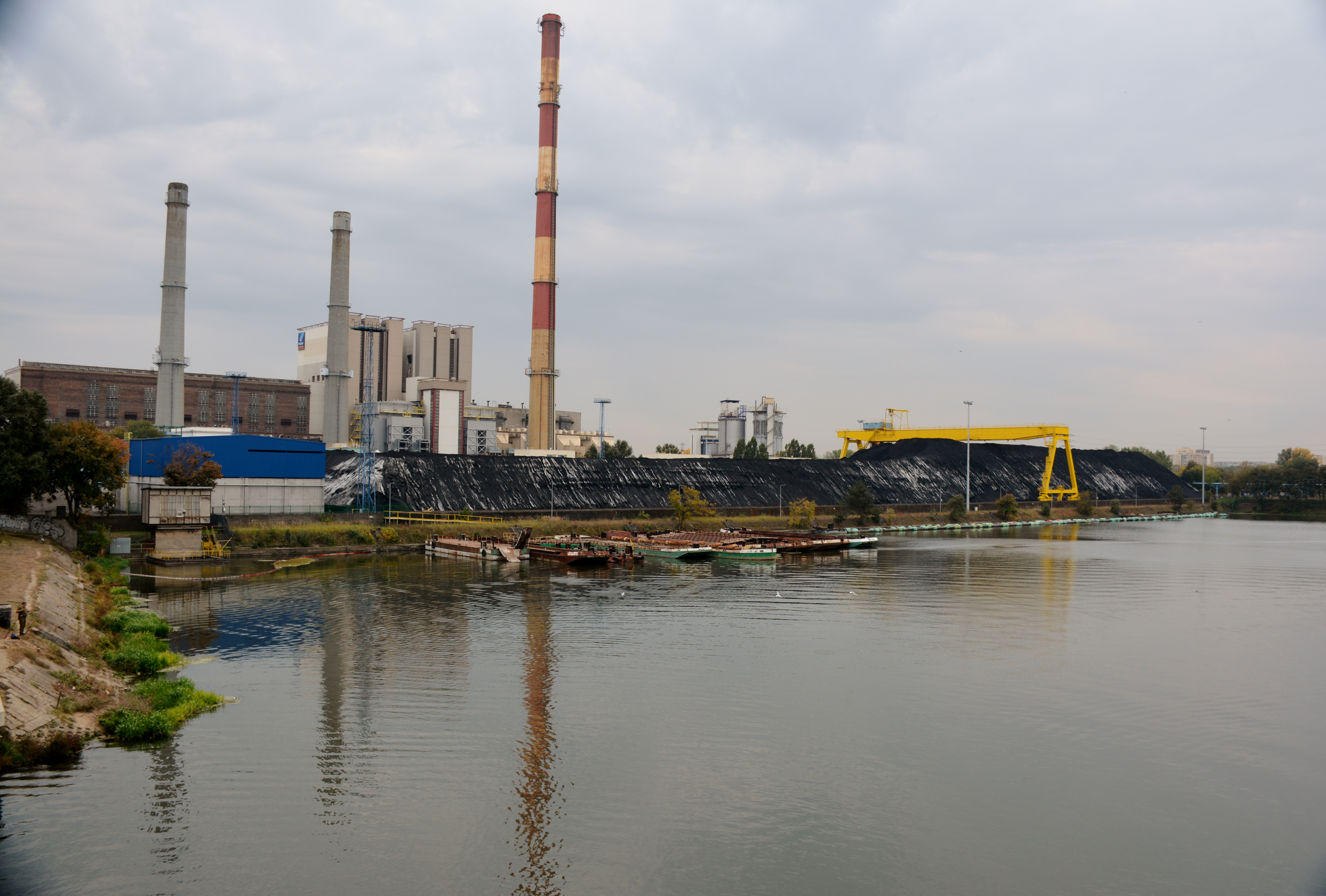 Żerań, Warszawa, Poland